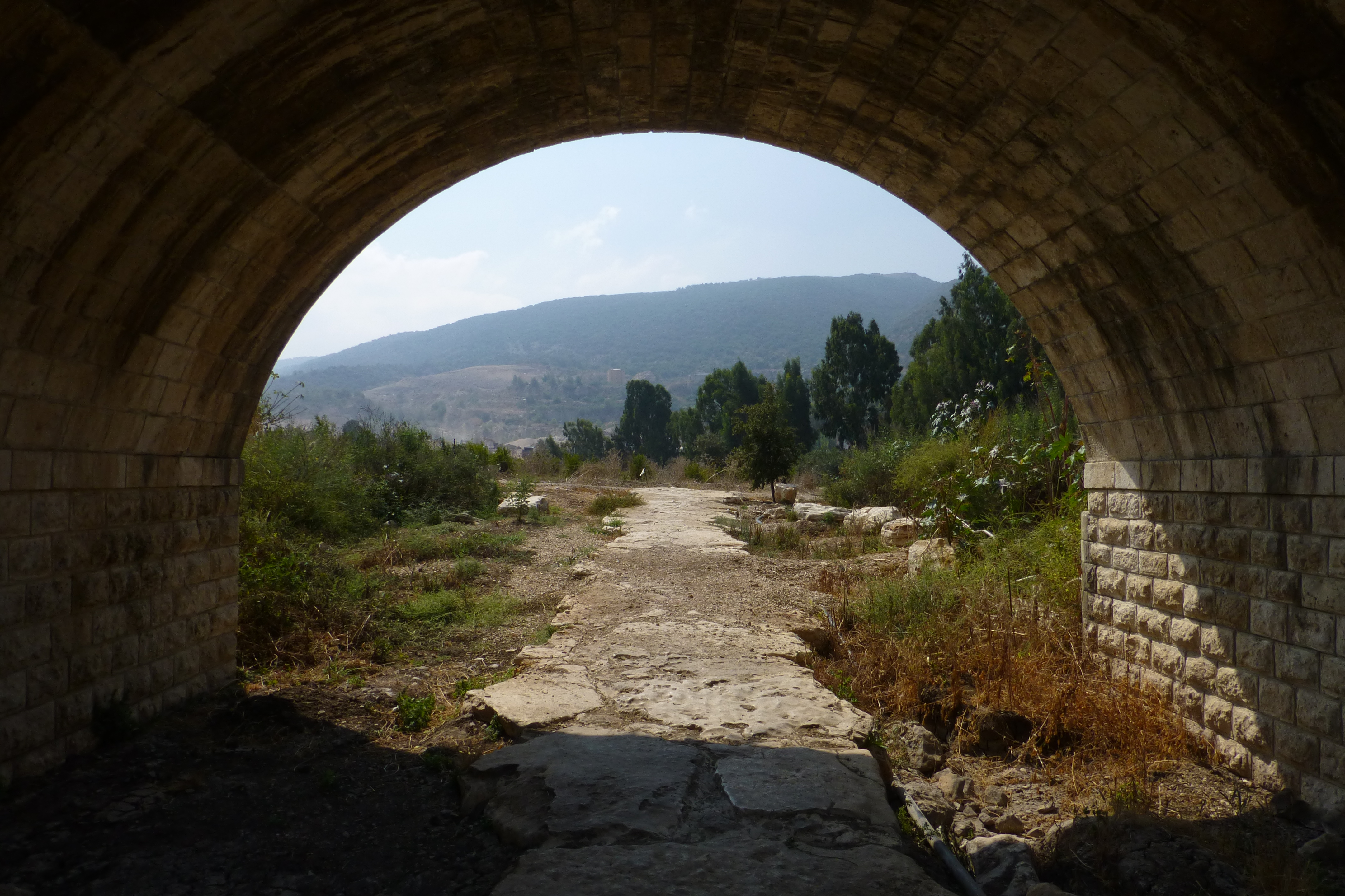 רכבת העמק - מעבירי מים והסוללה - צומת העמקים